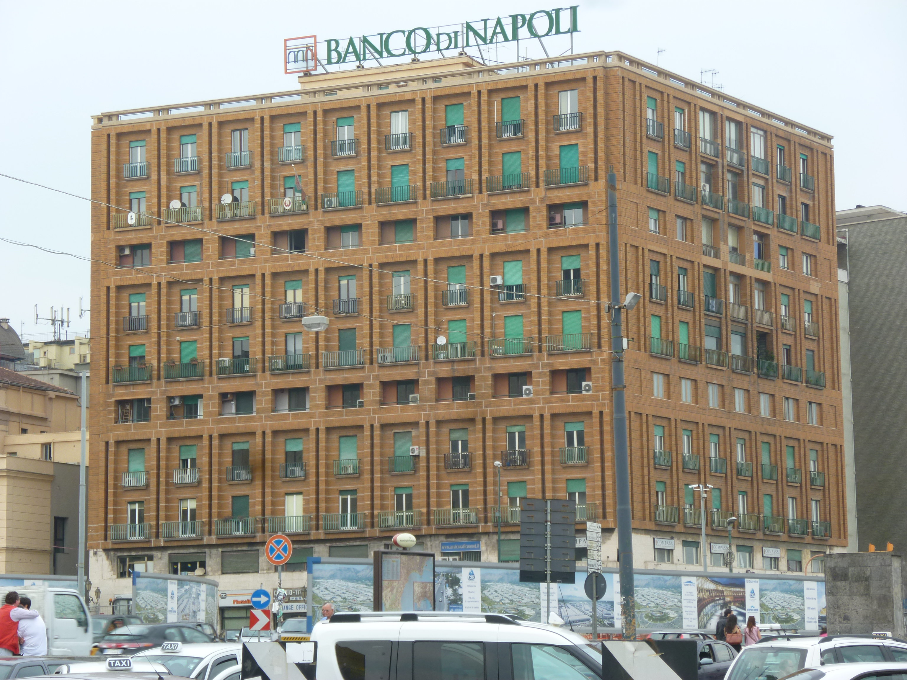 Napoli